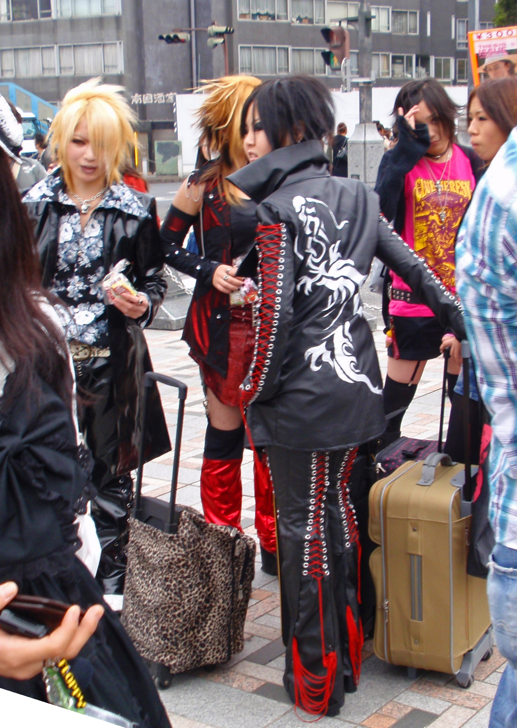 Harajuku, Tokyo